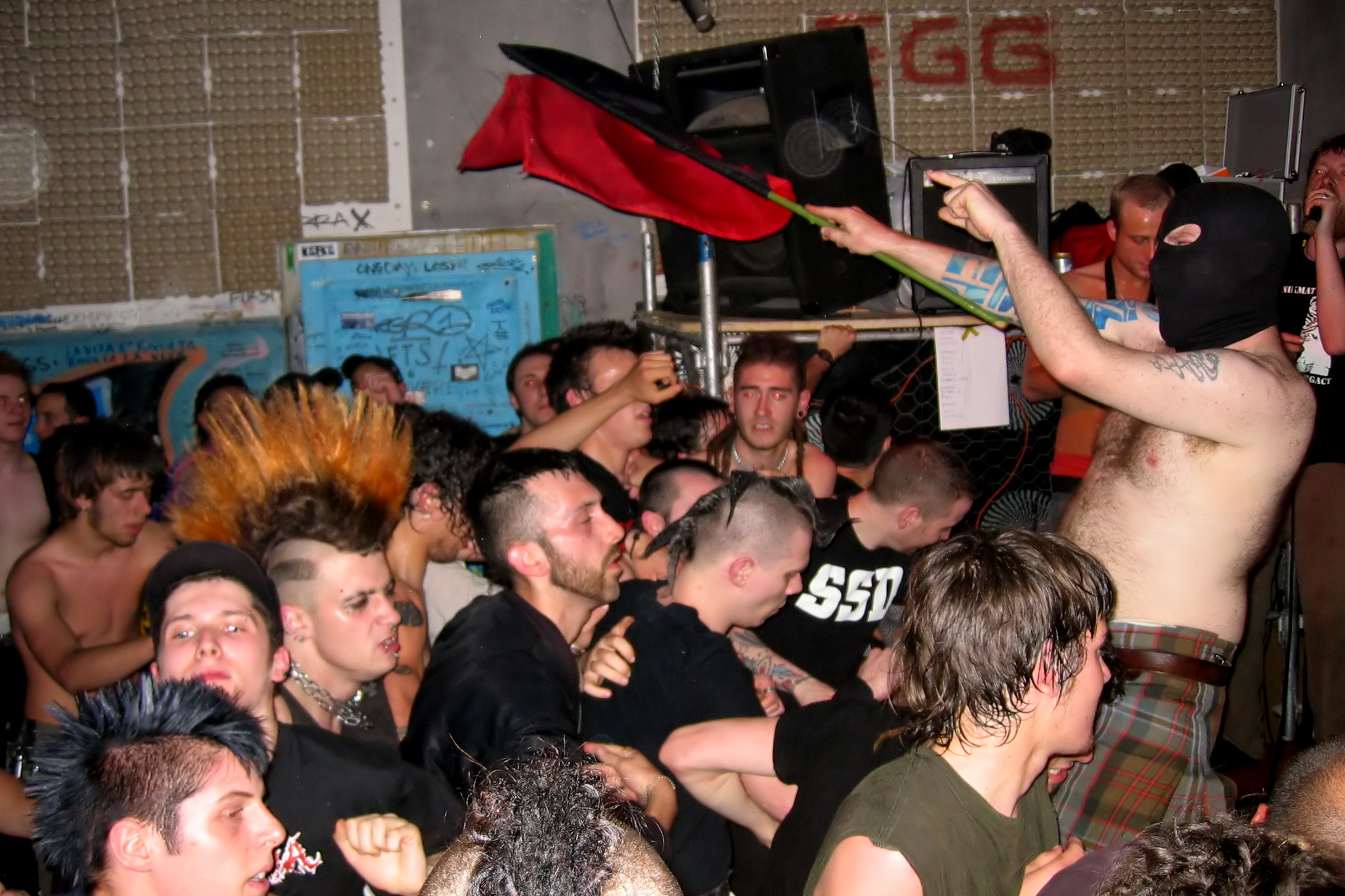 Oi Polloi live in 2006